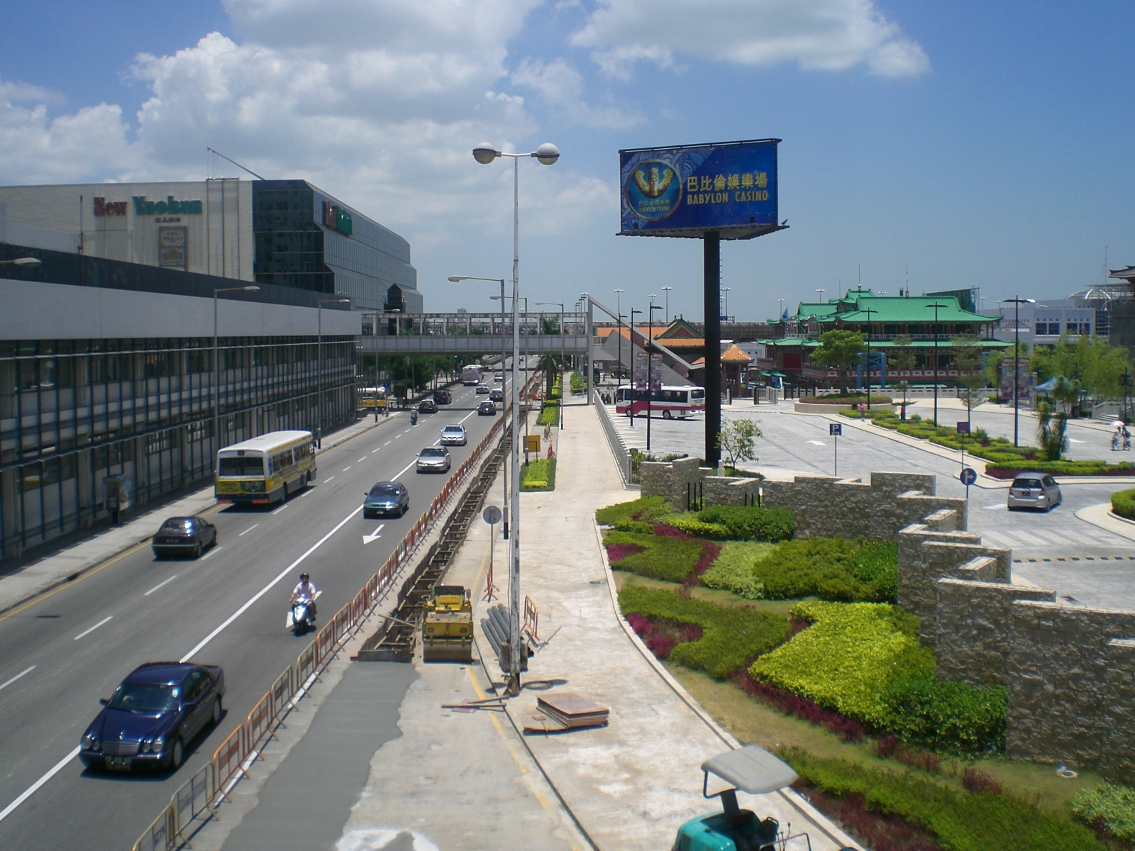 友誼大馬路 （葡文：Avenida da Amizade）, 新八佰伴, 皇宮娛樂場、澳門漁人碼頭. Photo author= Mo707